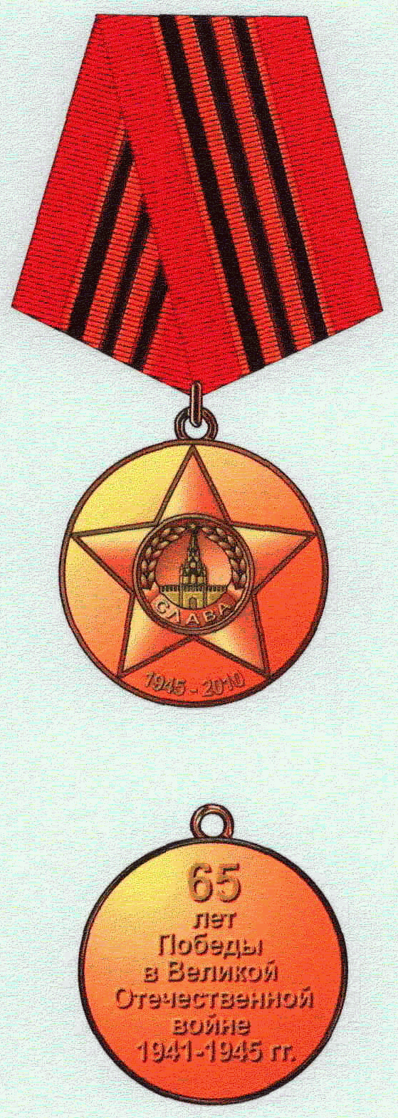 Юбилейная медаль «65 лет Победы в Великой Отечественной войне 1941—1945» / Medal 65 years to great patriotic war